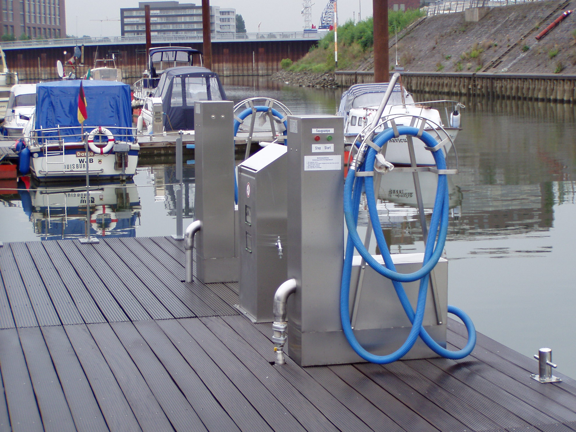 Fäkaliienabsaugstelle in einer Marina